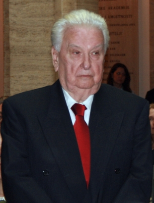 Tomislav Neralić, svečano proglašenje i predstavljanje novih članova Hrvatske akademije znanosti i umjetnosti u Zagrebu